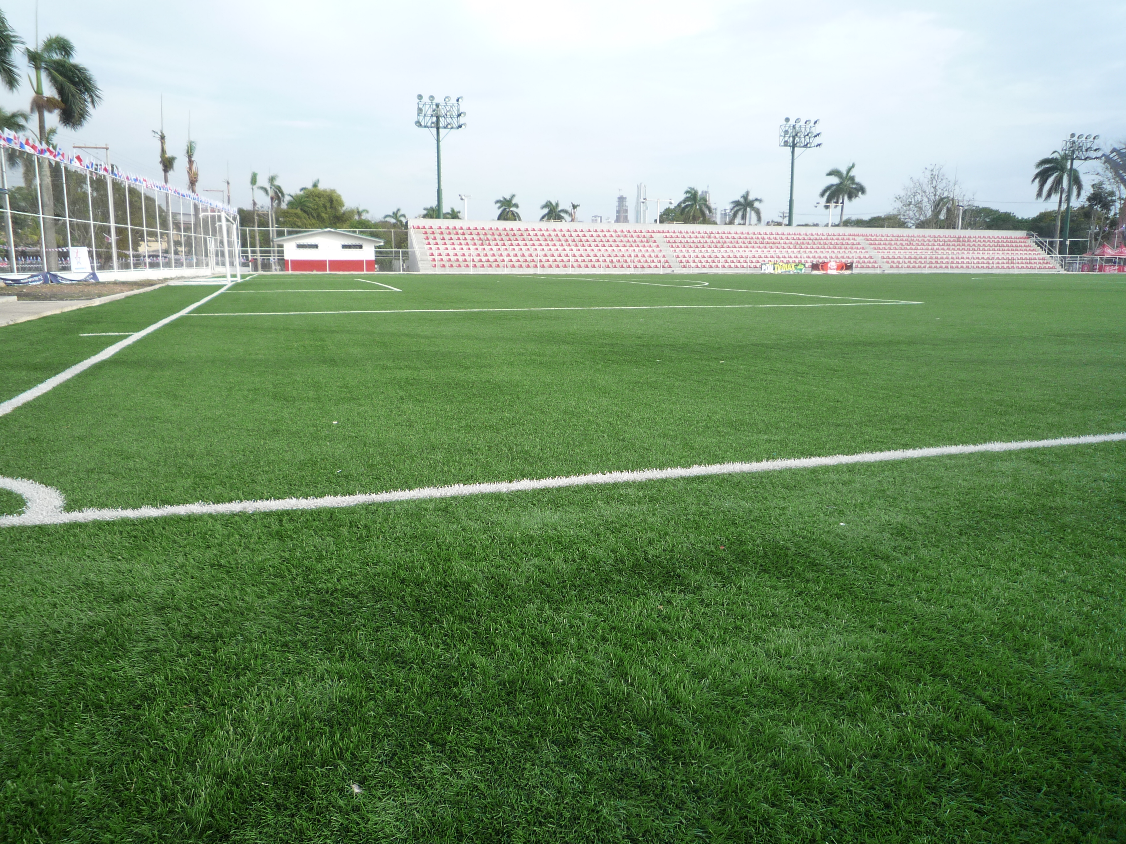 Cancha de entrenamiento del Estadio Rommel Fernandez.